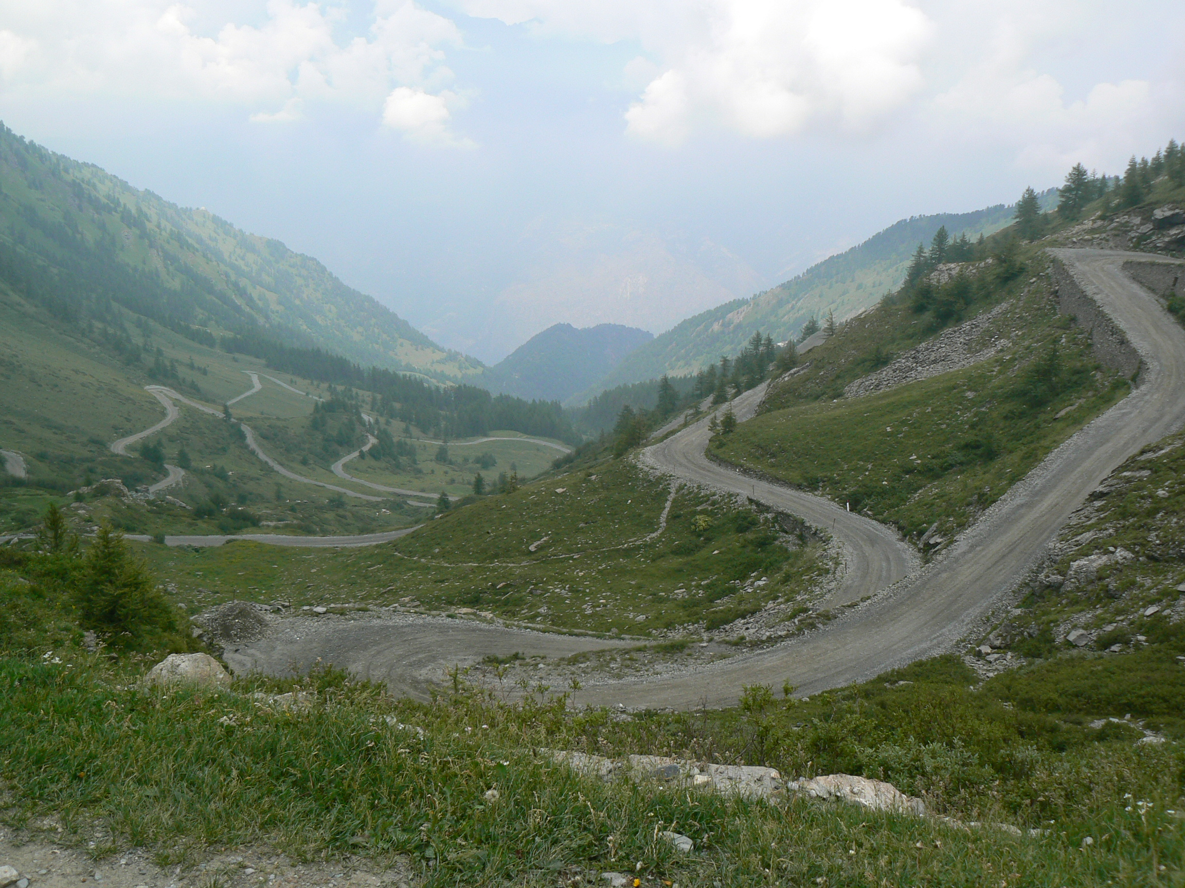 Gli ultimi chilometri dell'ascesa al Colle delle Finestre dal versante del comune di Meana di Susa